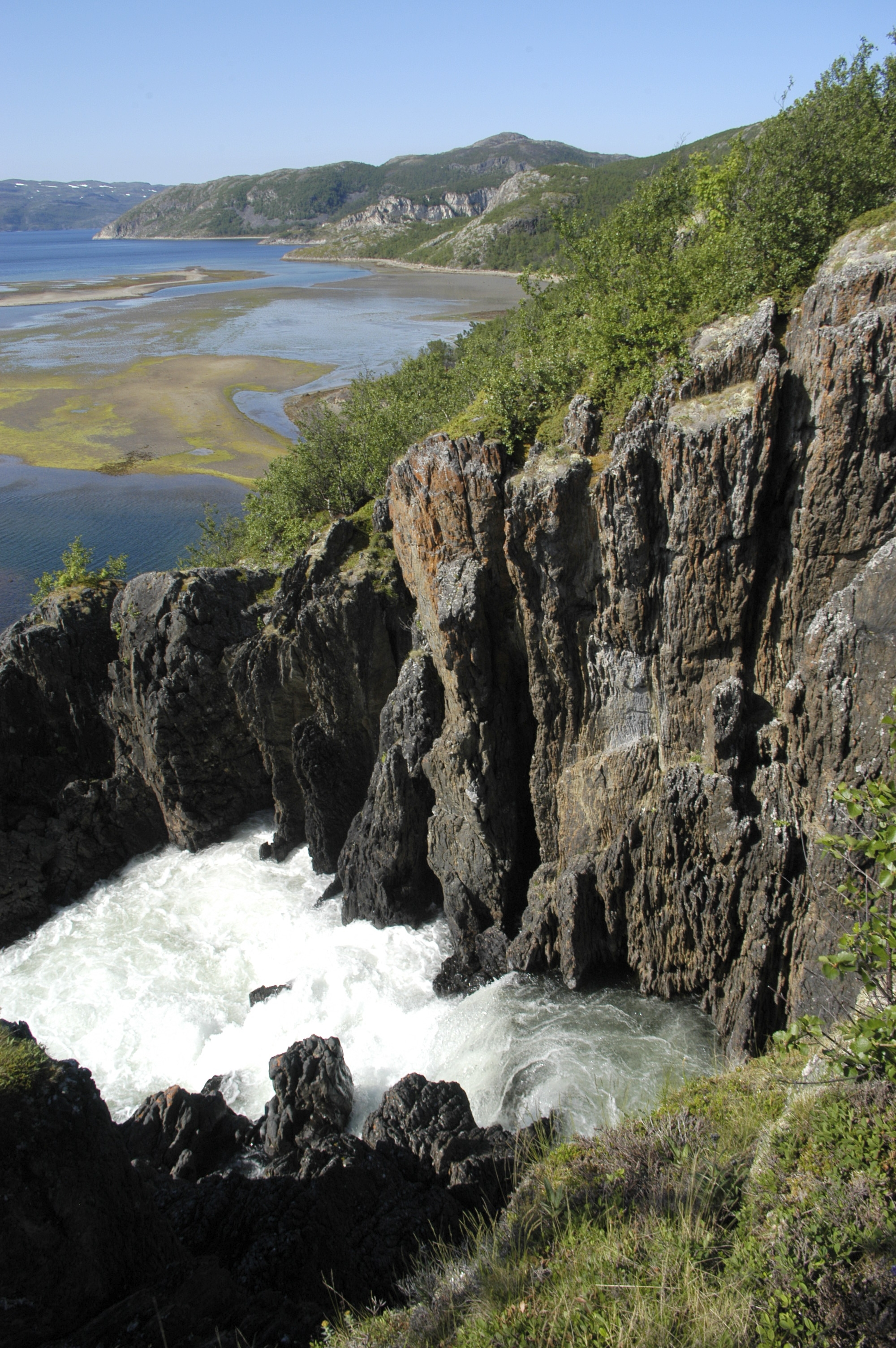 Adamsfjordfossen waterfall in Adamsfjord, Lebesby, Norway